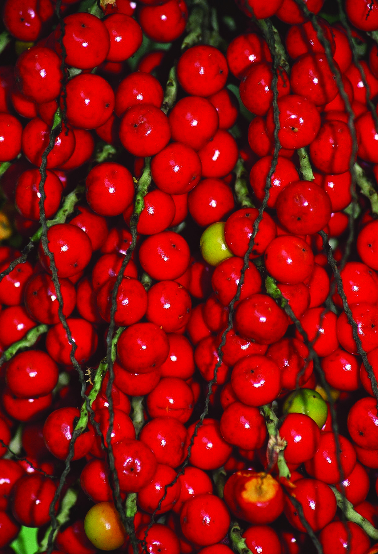 Jardin Botanico, San Juan, Puerto Rico